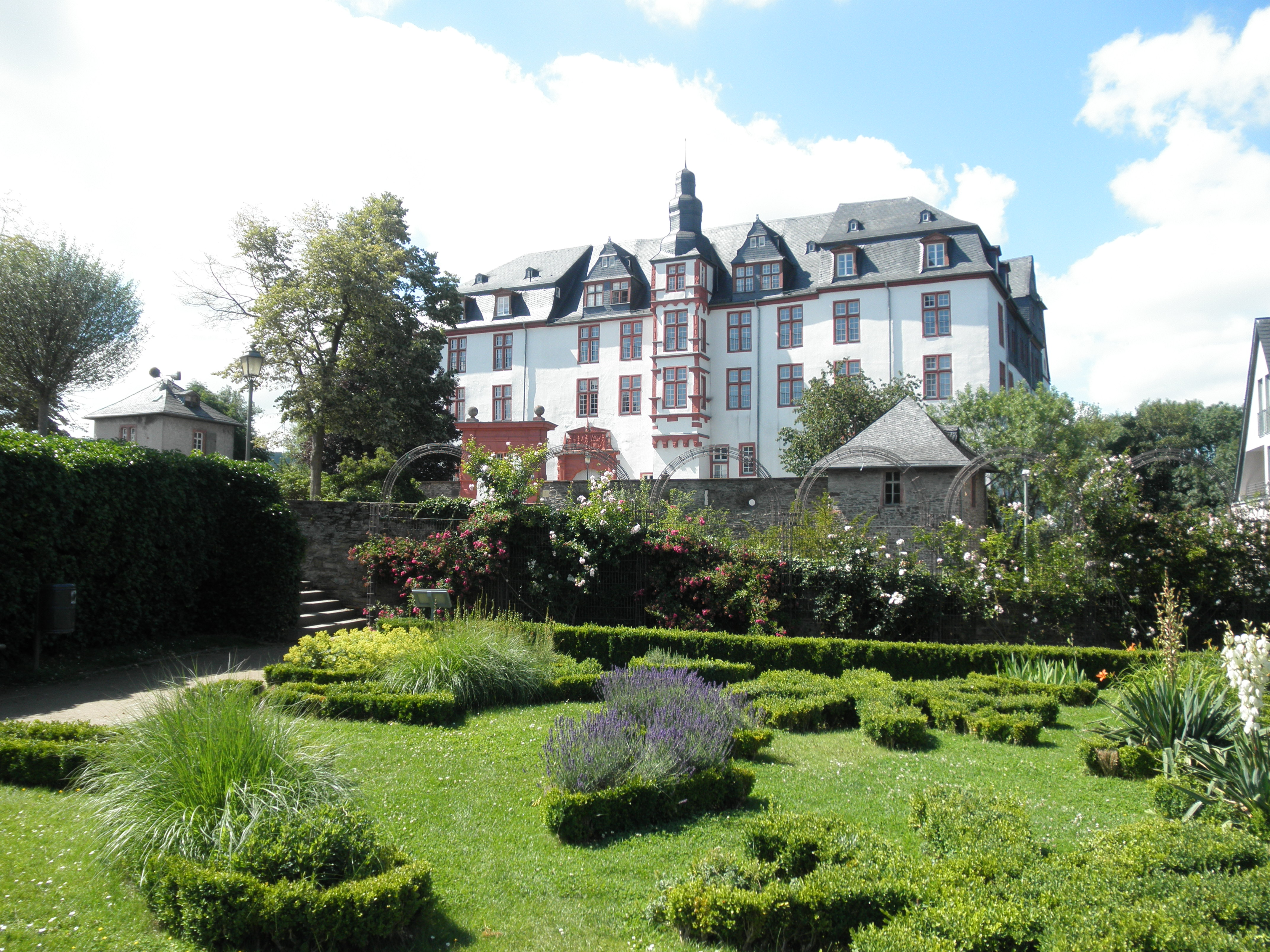 Renaissancegarten der Burg Idstein